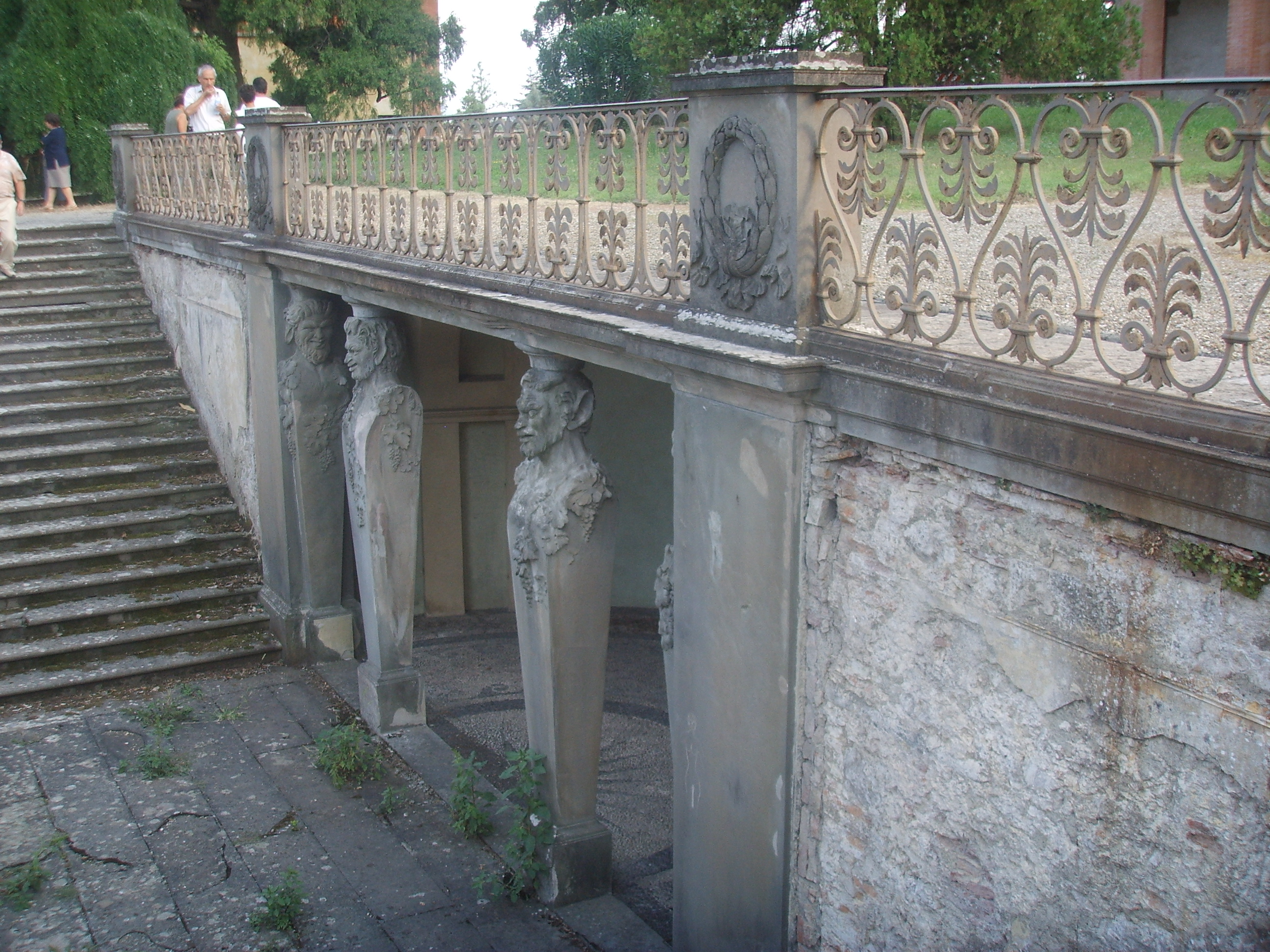 Poggio a Caiano Villa outside view in Poggio a Caiano, Italy